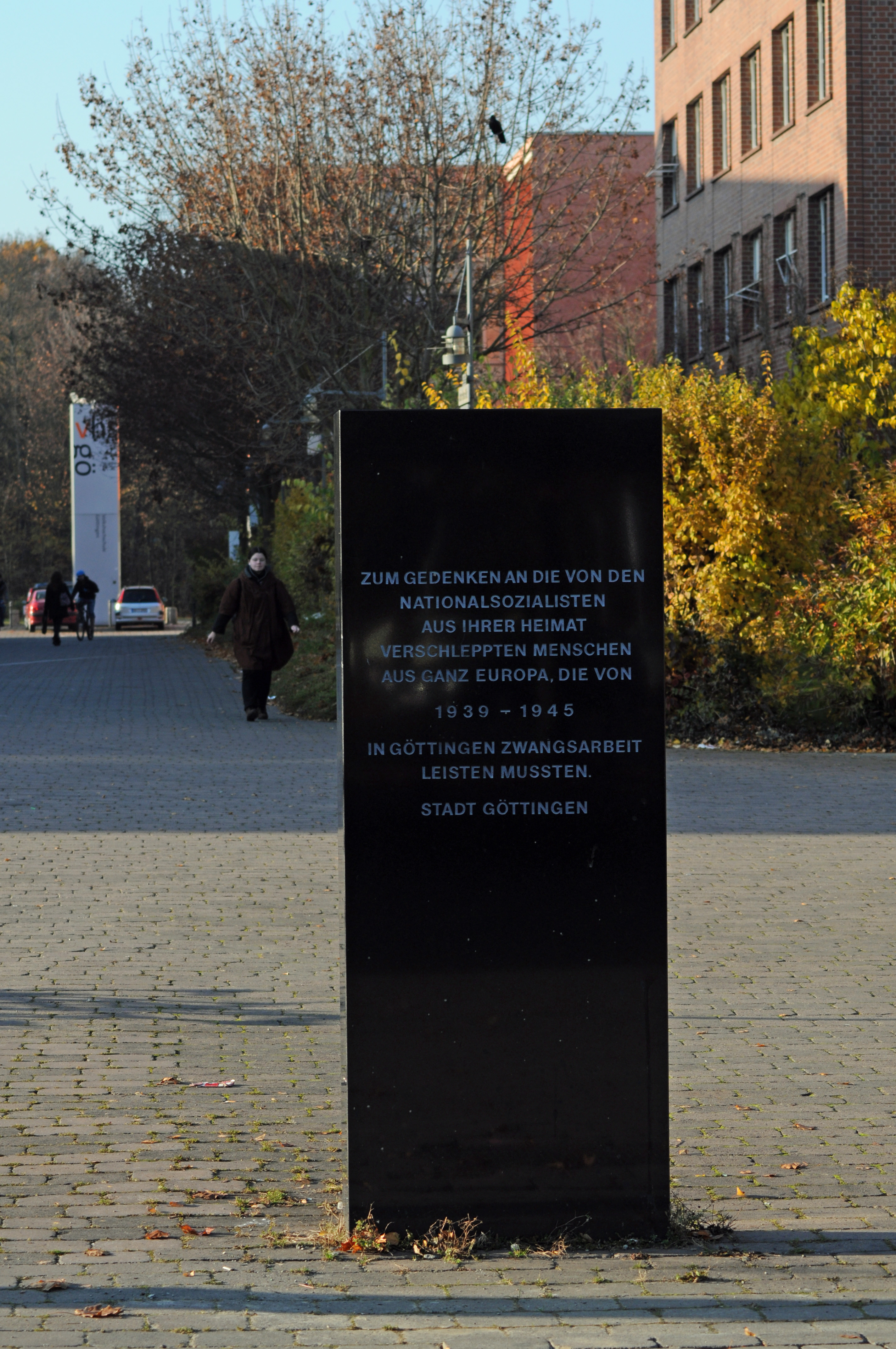 Denkmal für Zwangsarbeiter/innen von 1935 - 1945 in Göttingen. Das Denkmal befindet sich in der Nähe des Hauptbahnhofes - Agentur für Arbeit - Alte Lokhalle.